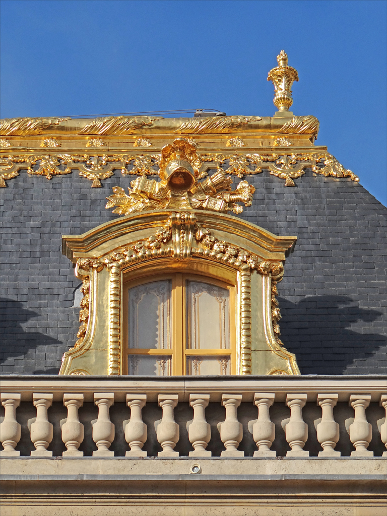 Les ornements de faîtage, en plomb et étain, ont été réalisées par Etienne Le Hongre, Noël Jouvenet et Pierre Mazeline de 1680 à 1684. Ces décors ont été redorés dans le cadre de la restauration de la cour de marbre à partir de 2006.